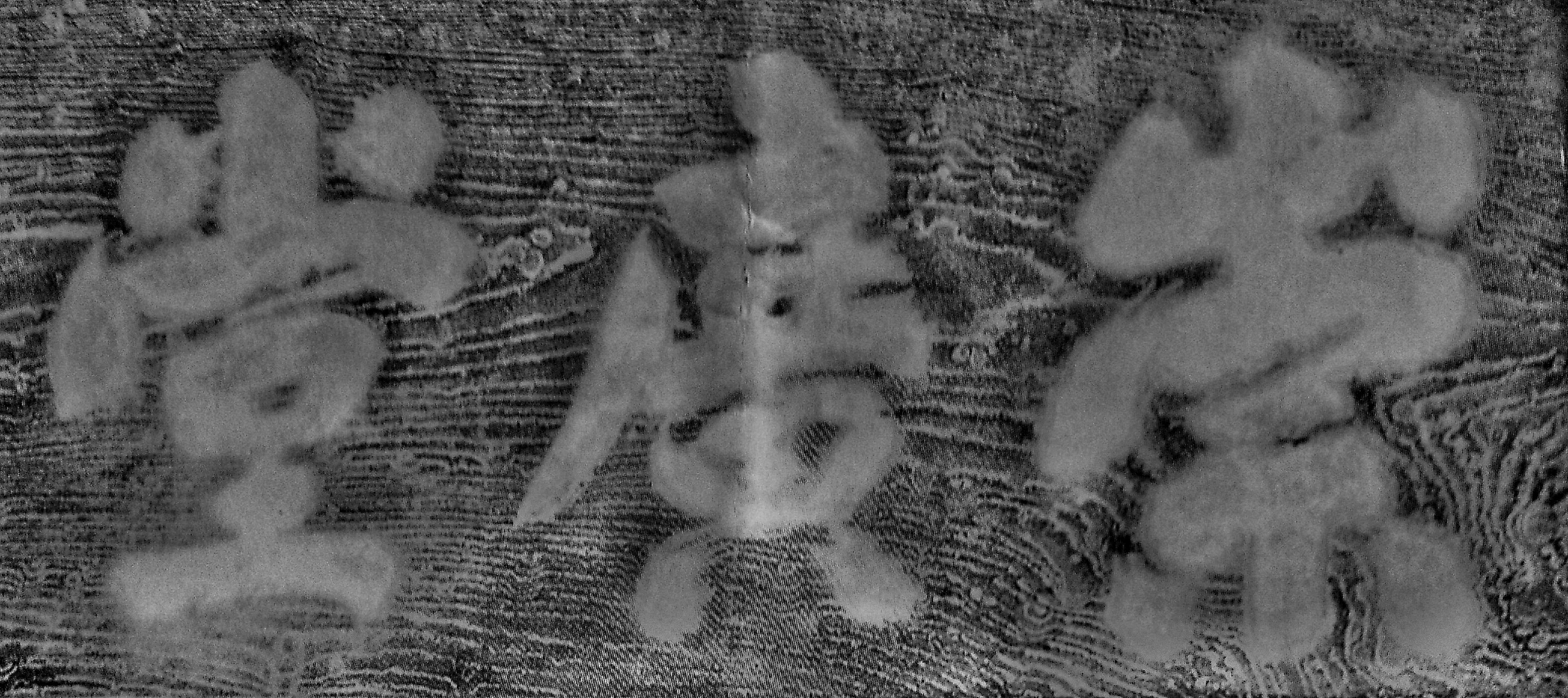 上杉鷹山筆